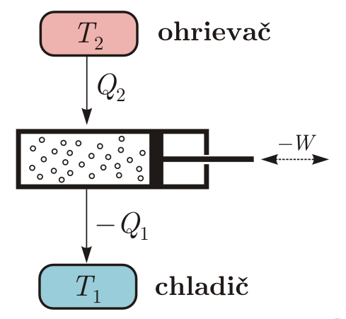 Schéma tepelného stroja